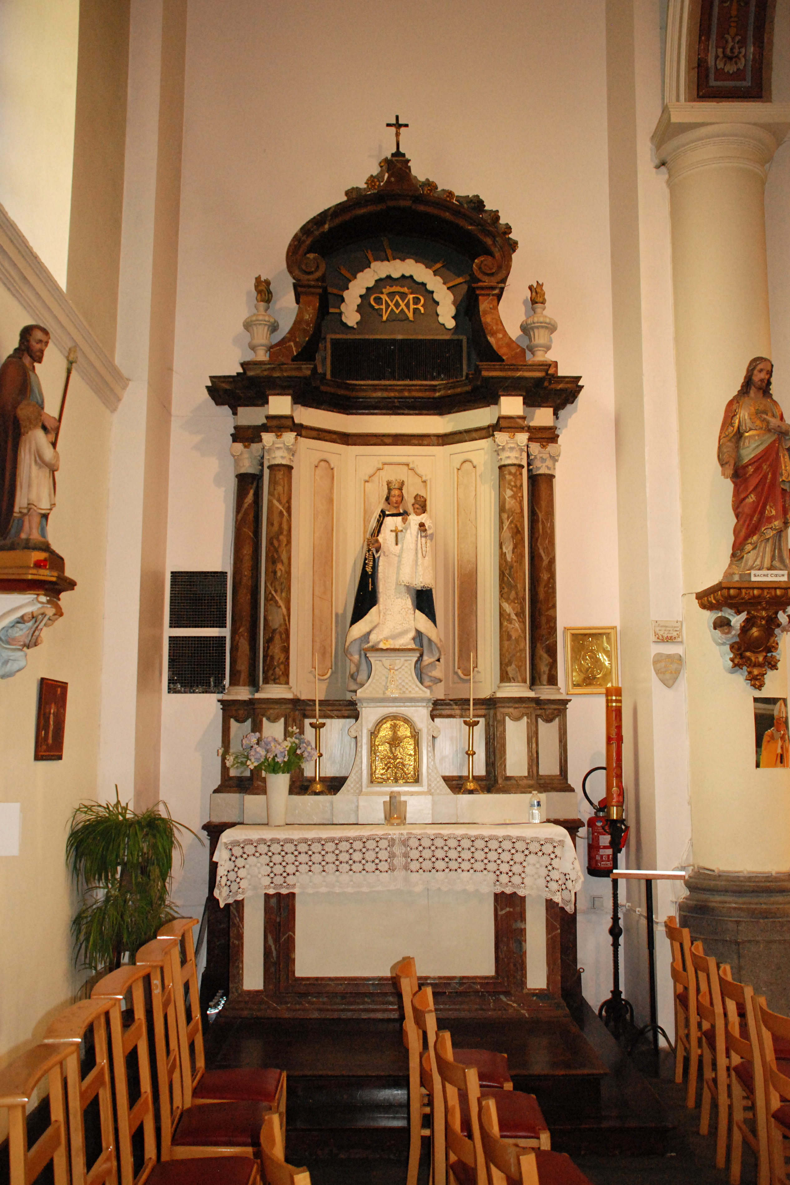 Belgique - Bousval - Église Saint-Barthélemy de Bousval